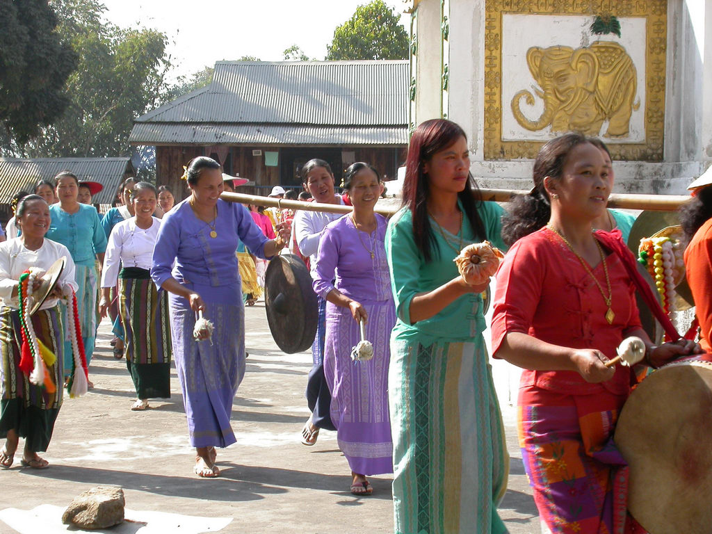 当地人在姐勒金塔过节，云南瑞丽。Festival in Jiele Pagoda, Rili, Yunnan.